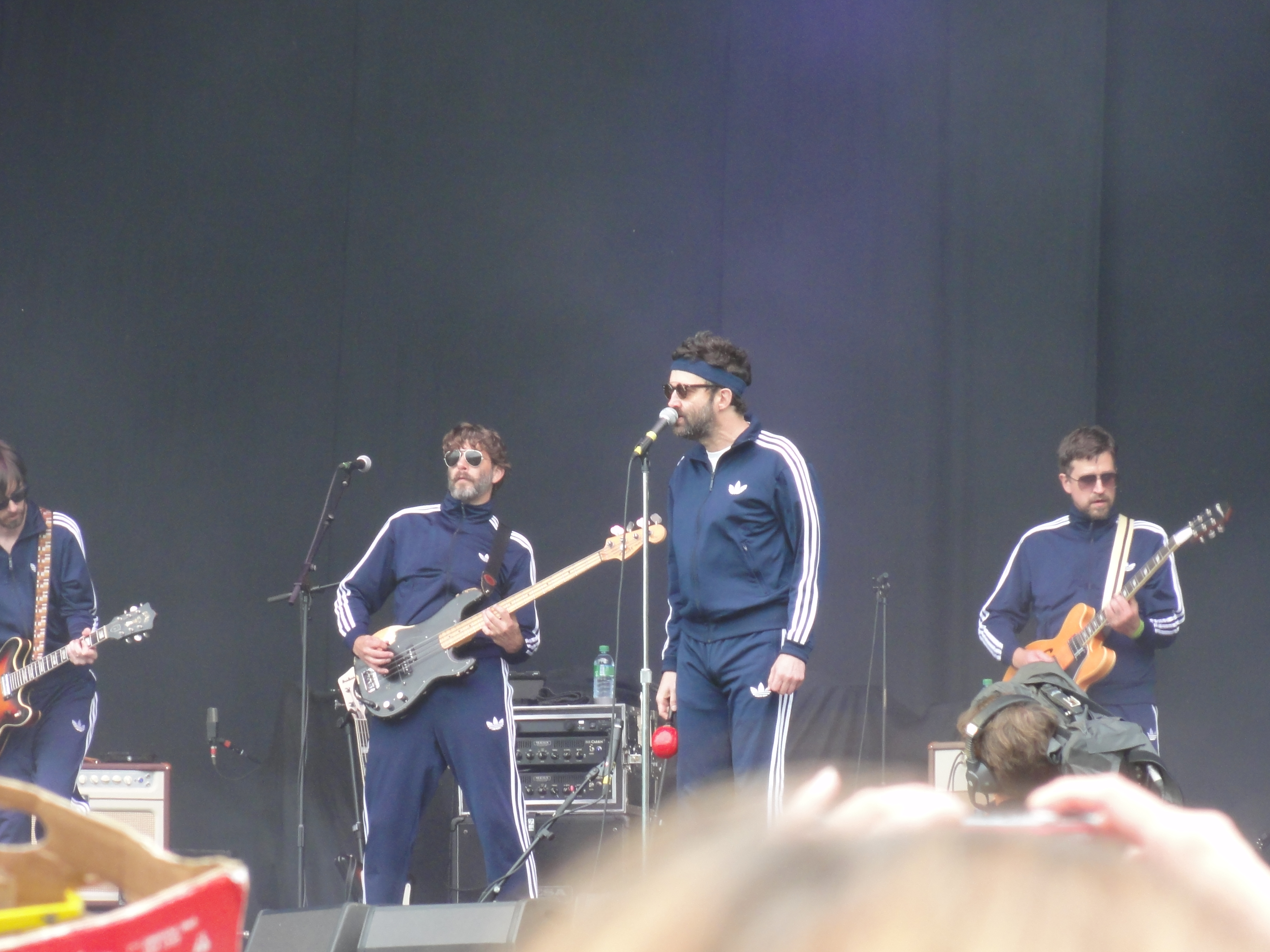 Rock en Seine